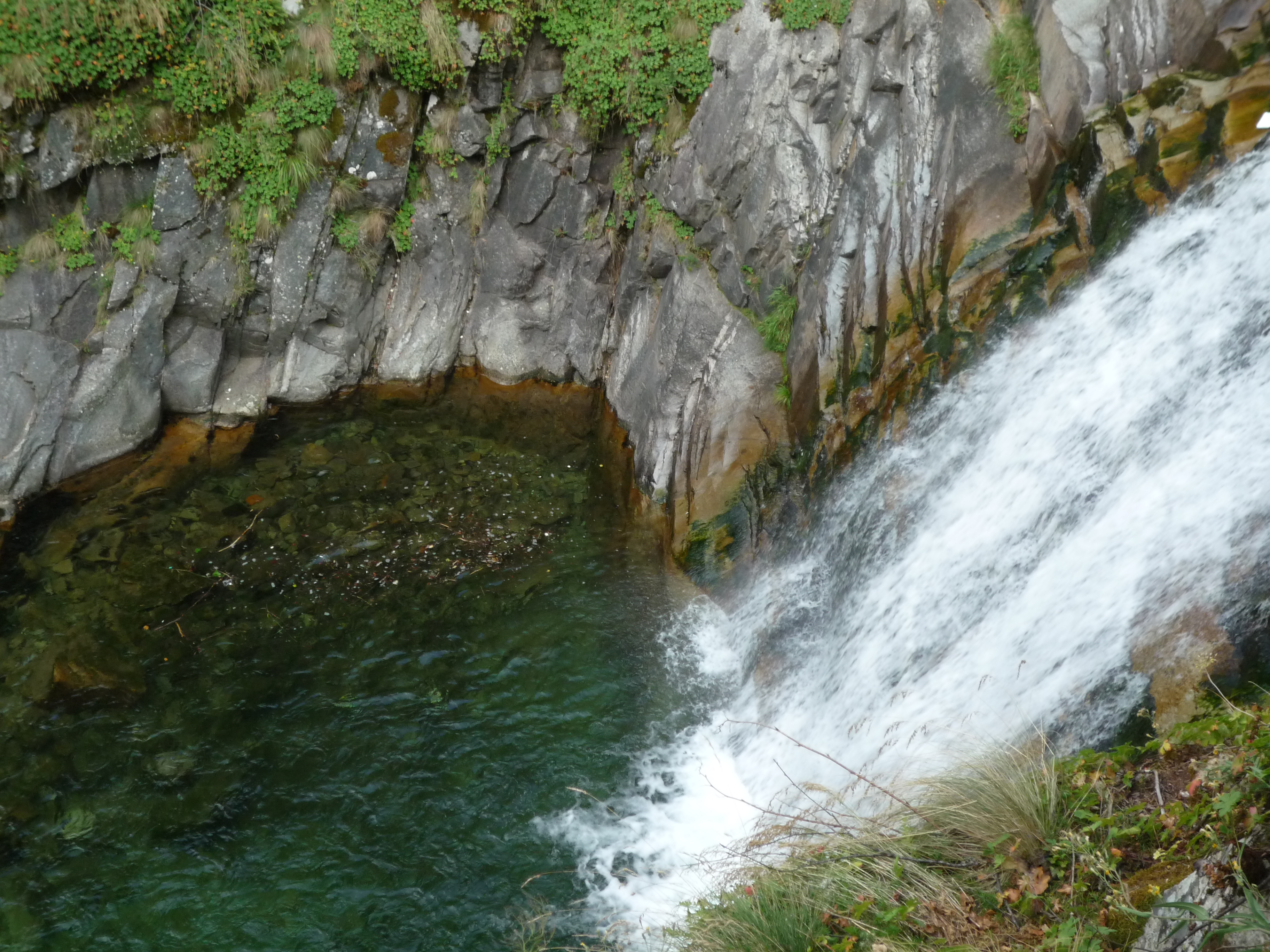 Водопад на р.Санданска бистрица